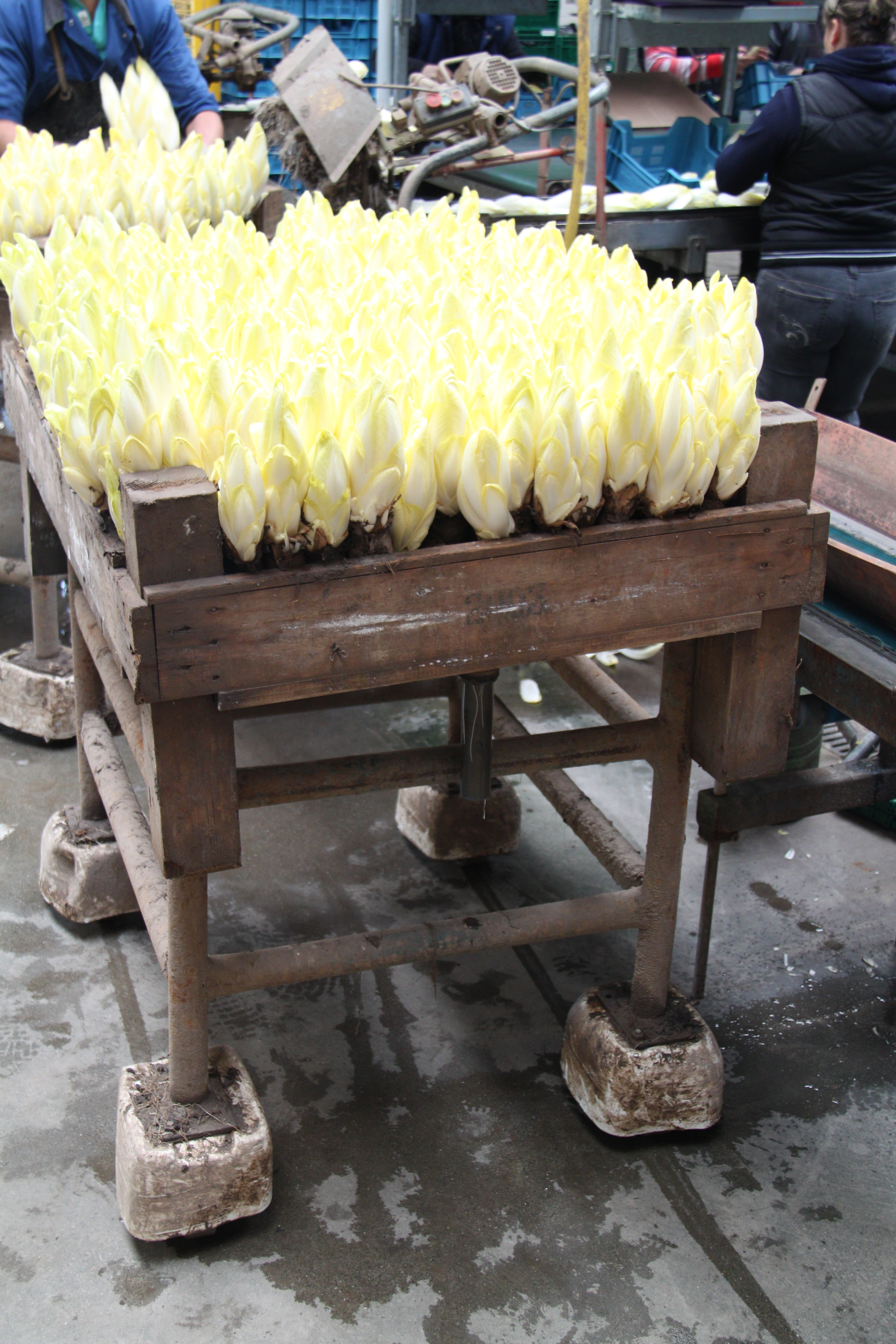 Chicorée Fabrik in Gelsdorf (am Tag der offenen Höfe) - Kiste mit erntefertigen Wurzeln kurz vor der maschinellen Trennung von Knospe und Wurzel